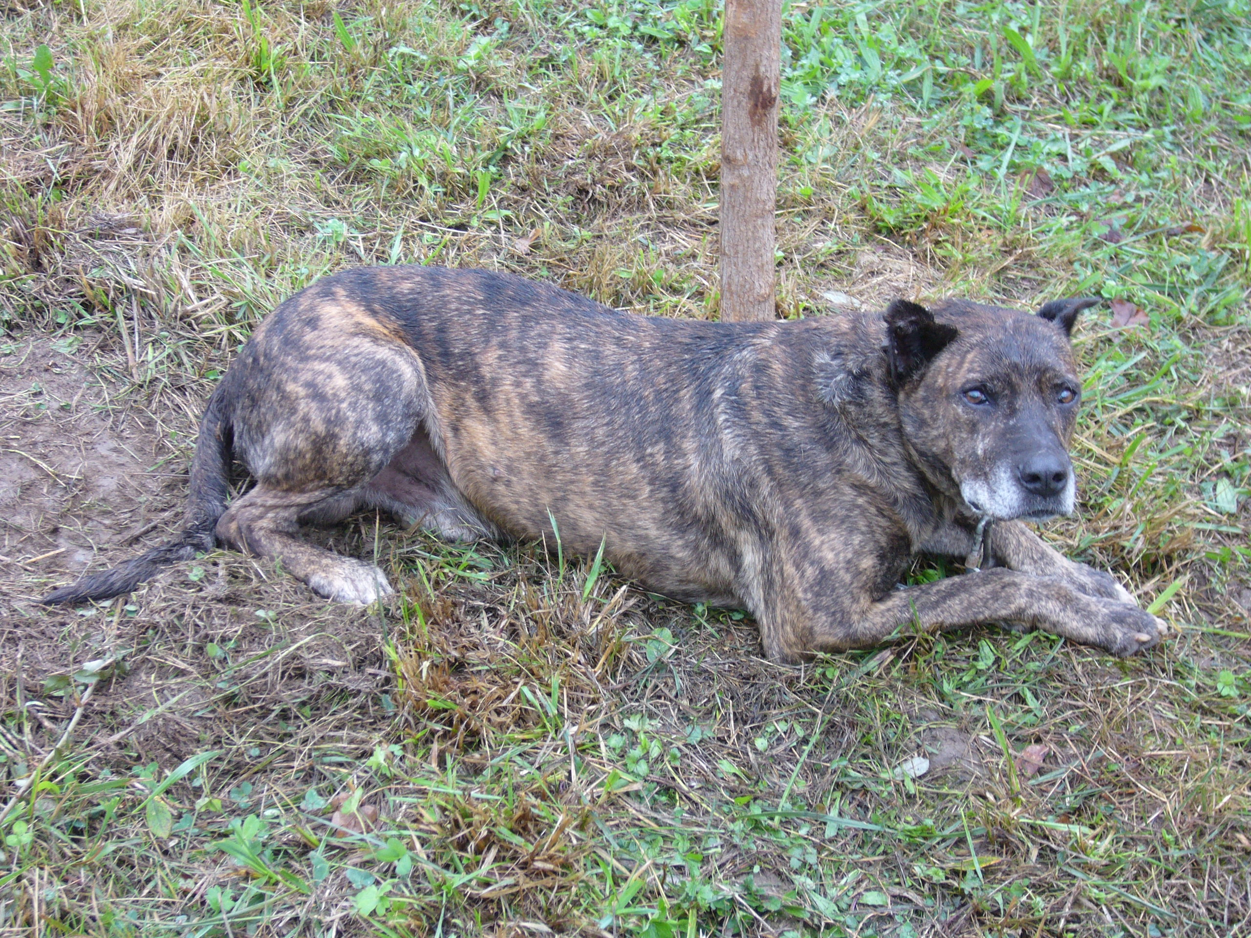 Zakur billanoa. Arra